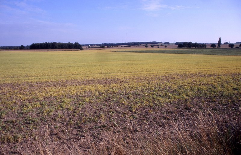 Großflächige Abtötung von Pflanzen auf einem Acker bei Medingen mittels Roundup